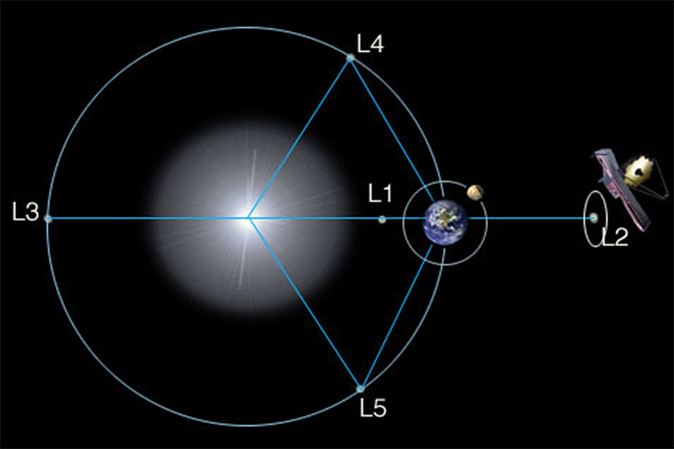 Le télescope spatial infrarouge JWST au point de Lagrange L2